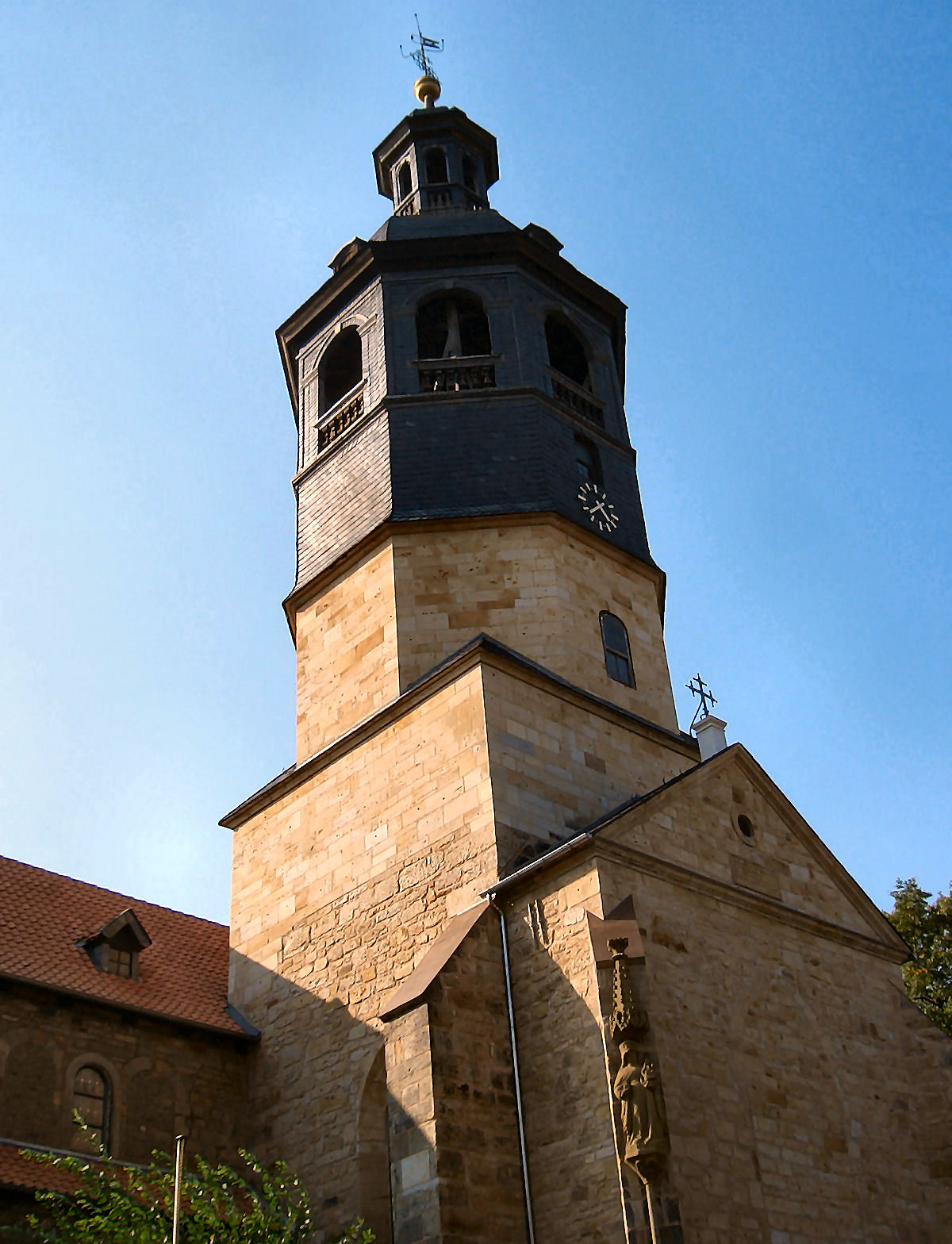 Kirchturm der St.-Mauritius-Kirche (Hildesheim)